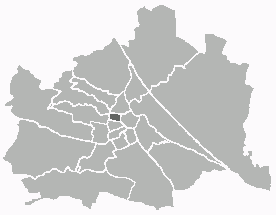 Positionskarte des 8. Wiener Gemeindebezirks Unter Verwendung einer Vorlage von Extrawurst. Public Domain.